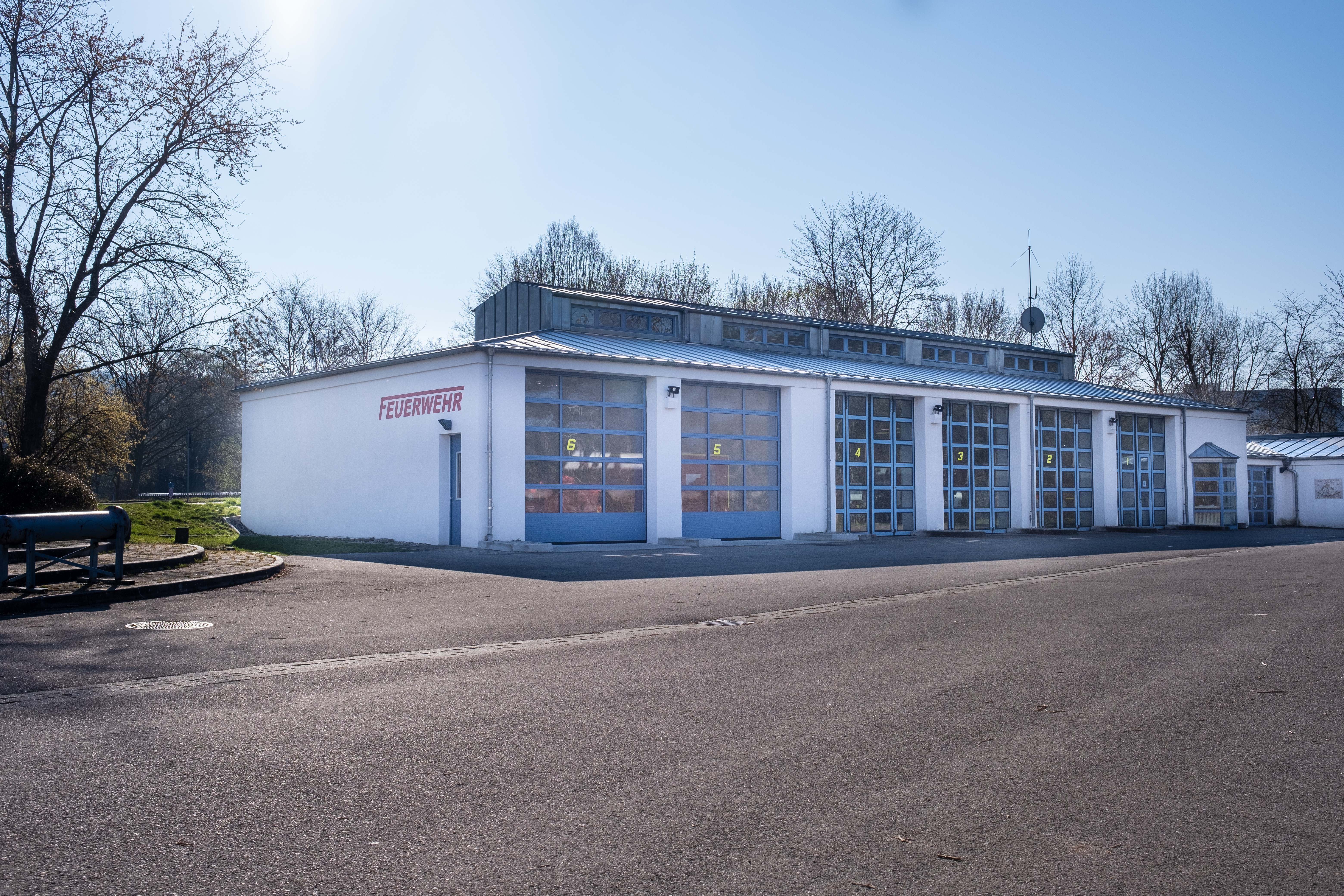 Feuerwehr Derendingen